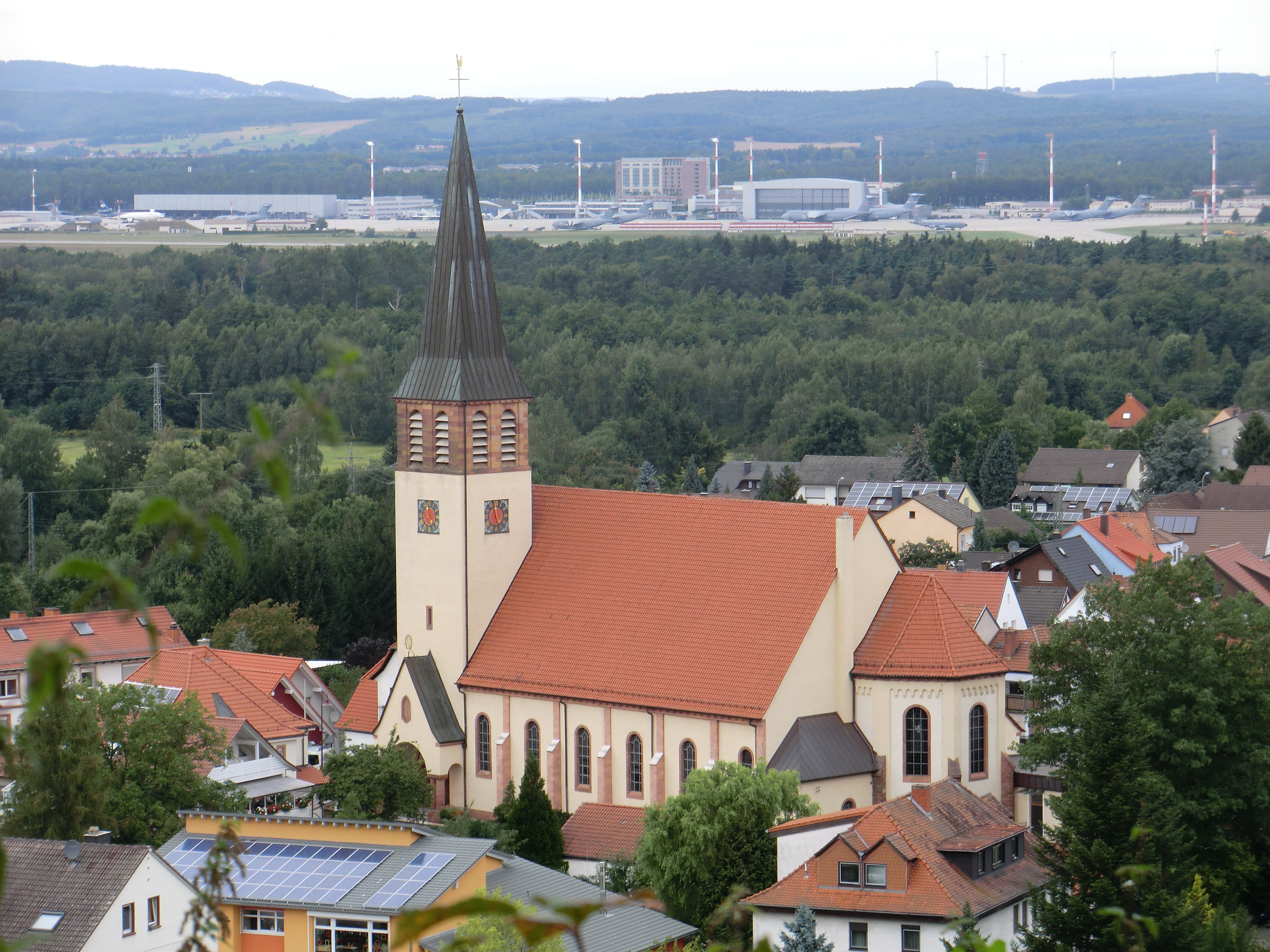 Blick vom Kindsbacher Berg